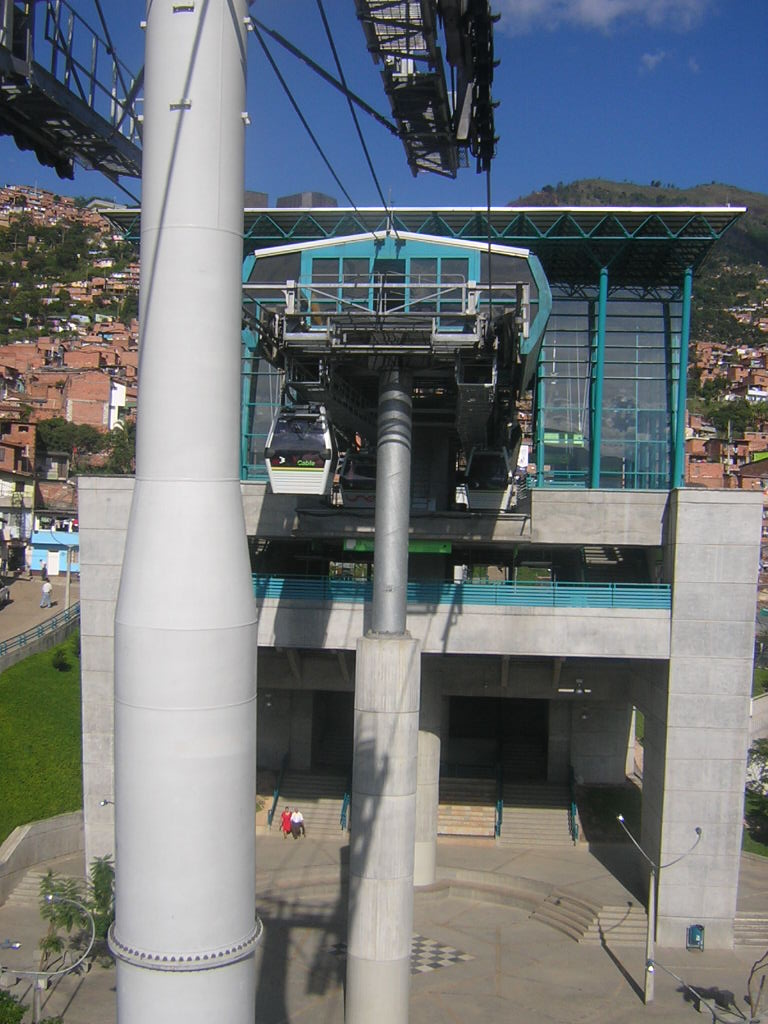 Metro de Medellín, Estación Popular. Medellín, Colombia.